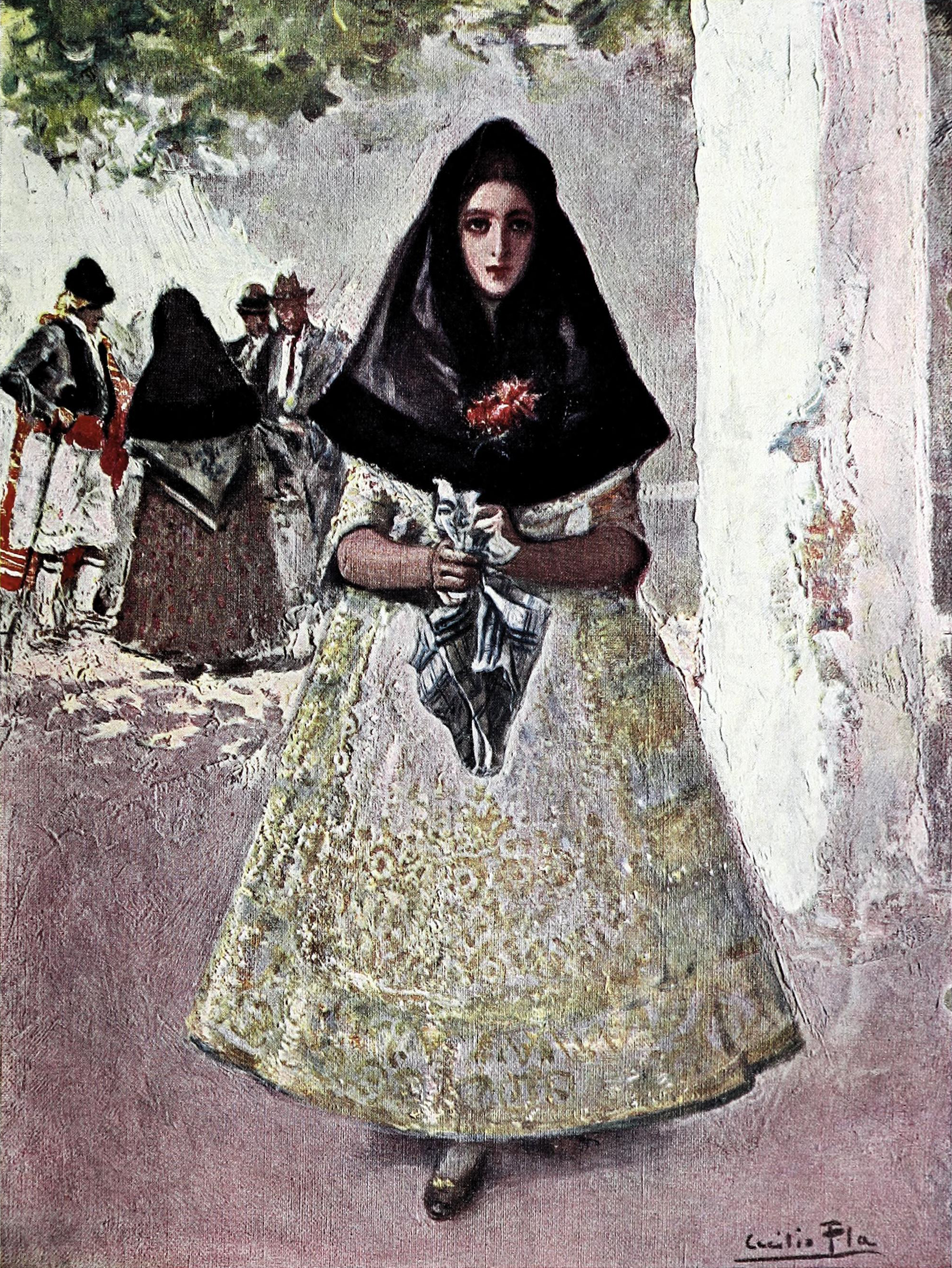 Figuras teatrales. María del Carmen.